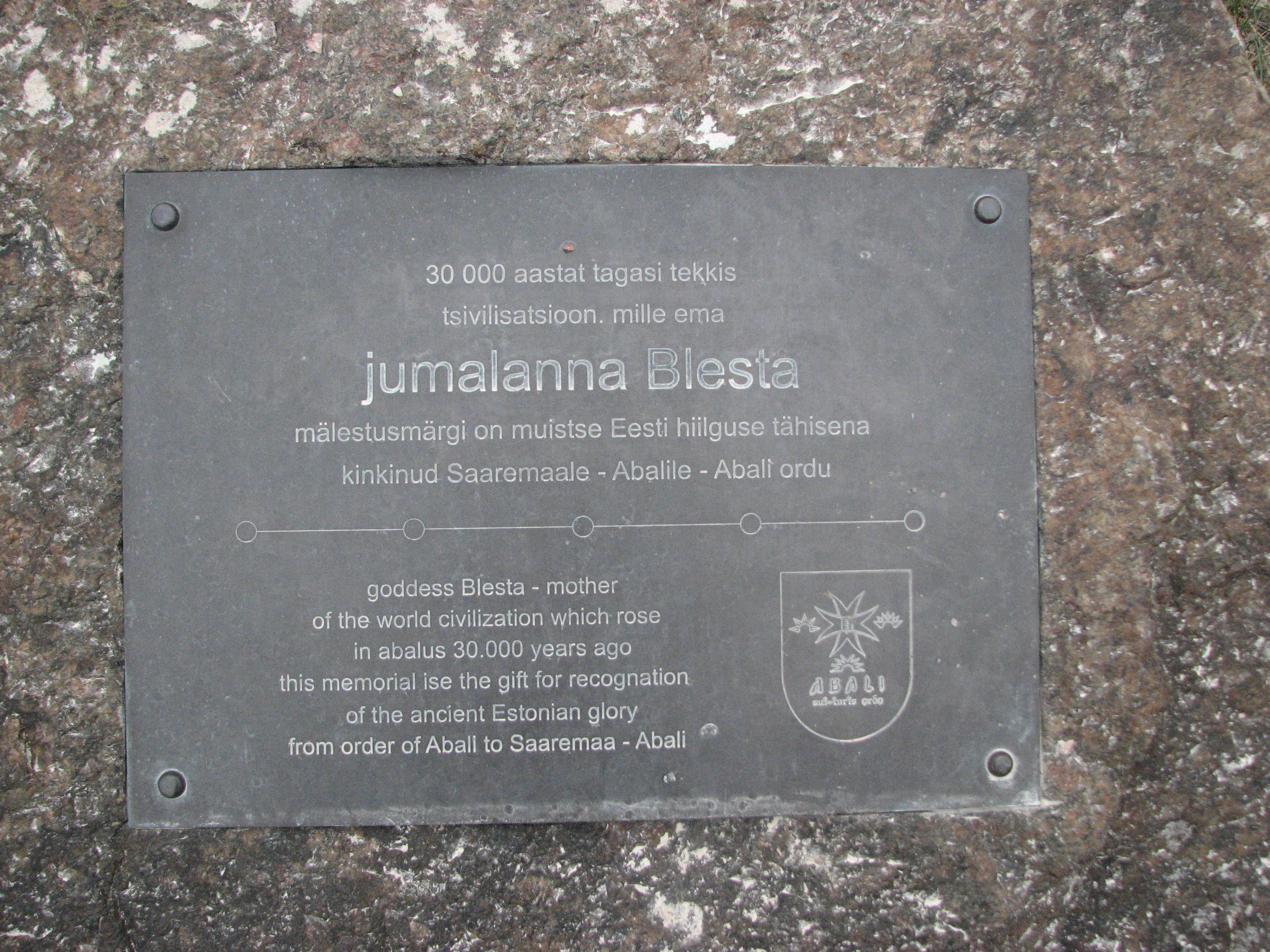 Tahvel kividest ringi keskel Laheküla servas Laimjala vallas